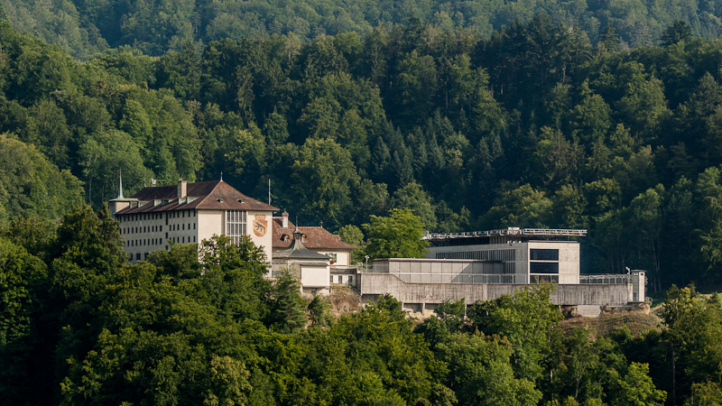 Schloss Thorberg mit Nebengebäuden